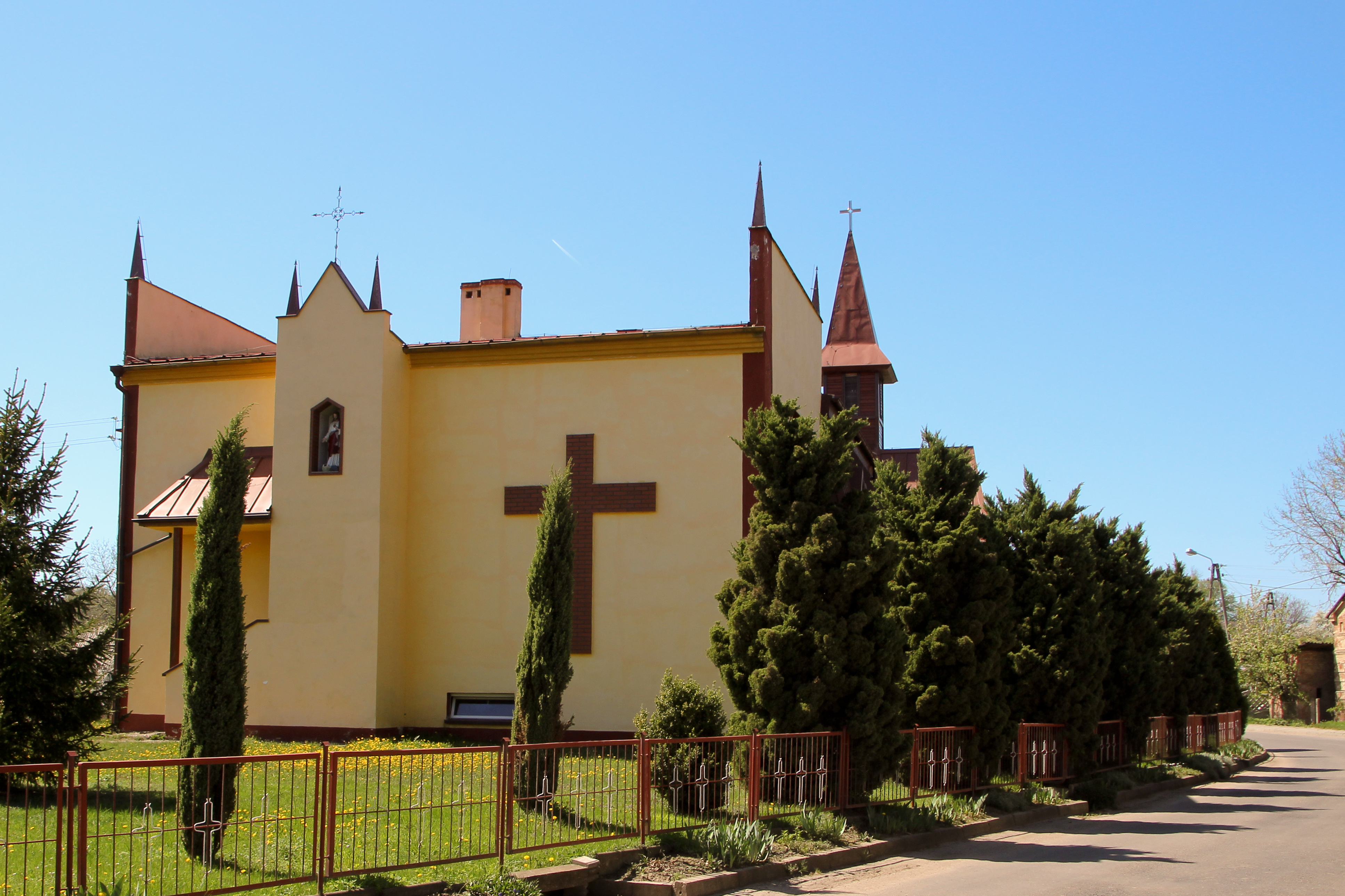 Nowe kościół w Rozumicach – wieś w województwie opolskim, w powiecie głubczyckim, w gminie Kietrz.